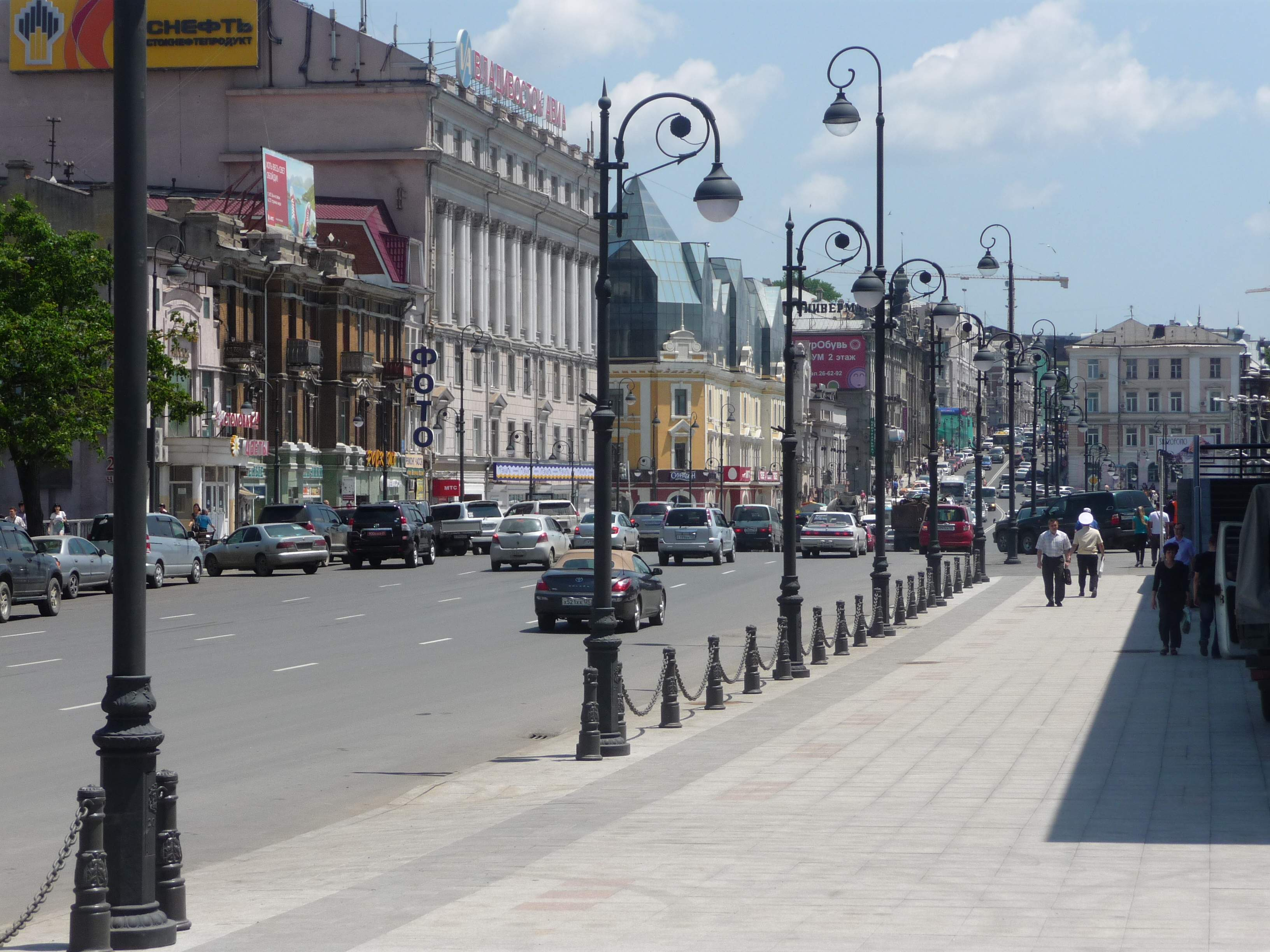 Владивосток, центр города, ул. Светланская, 2011-07-04